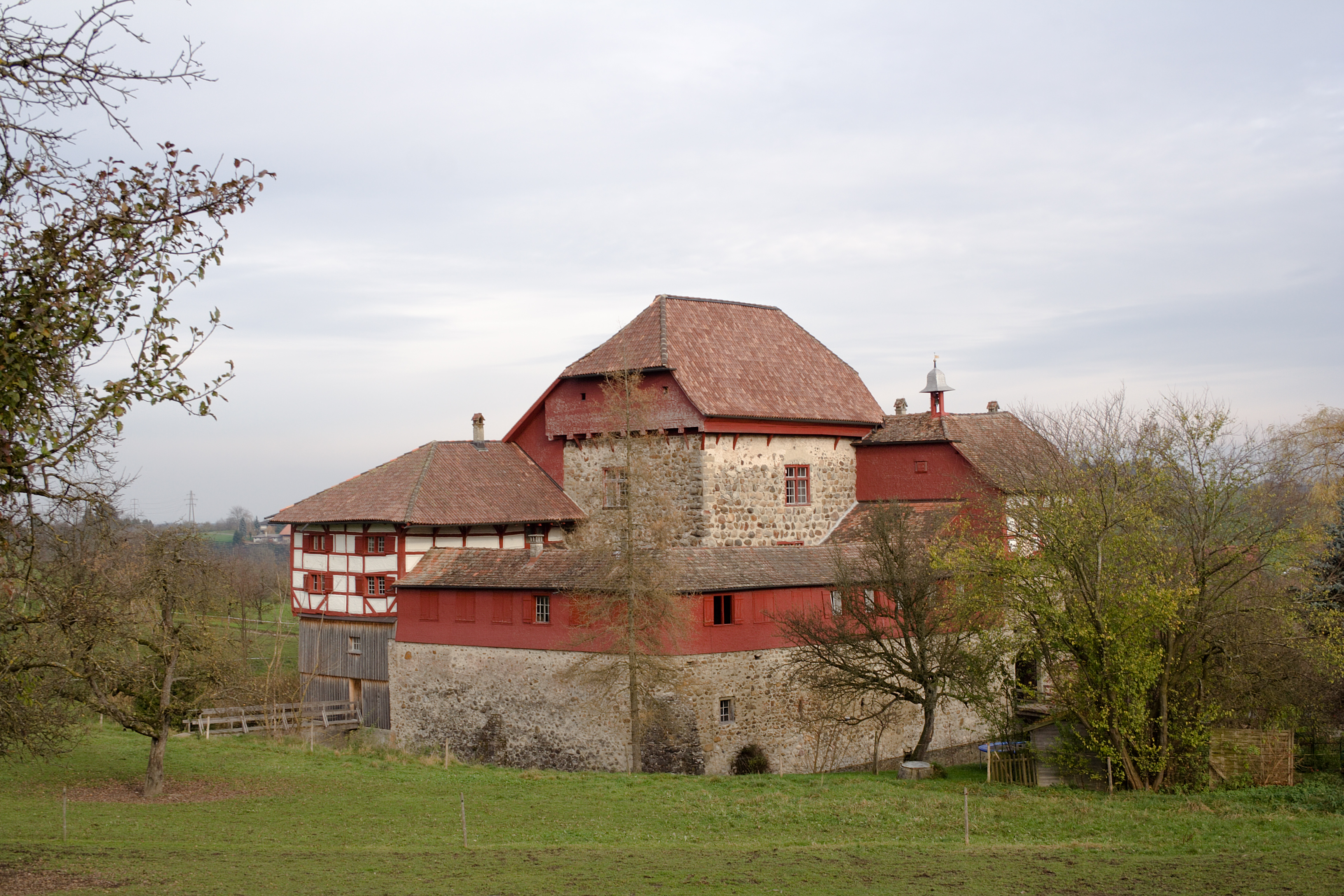 Schloss Hagenwil, Gemeinde Amriswil, Schweiz